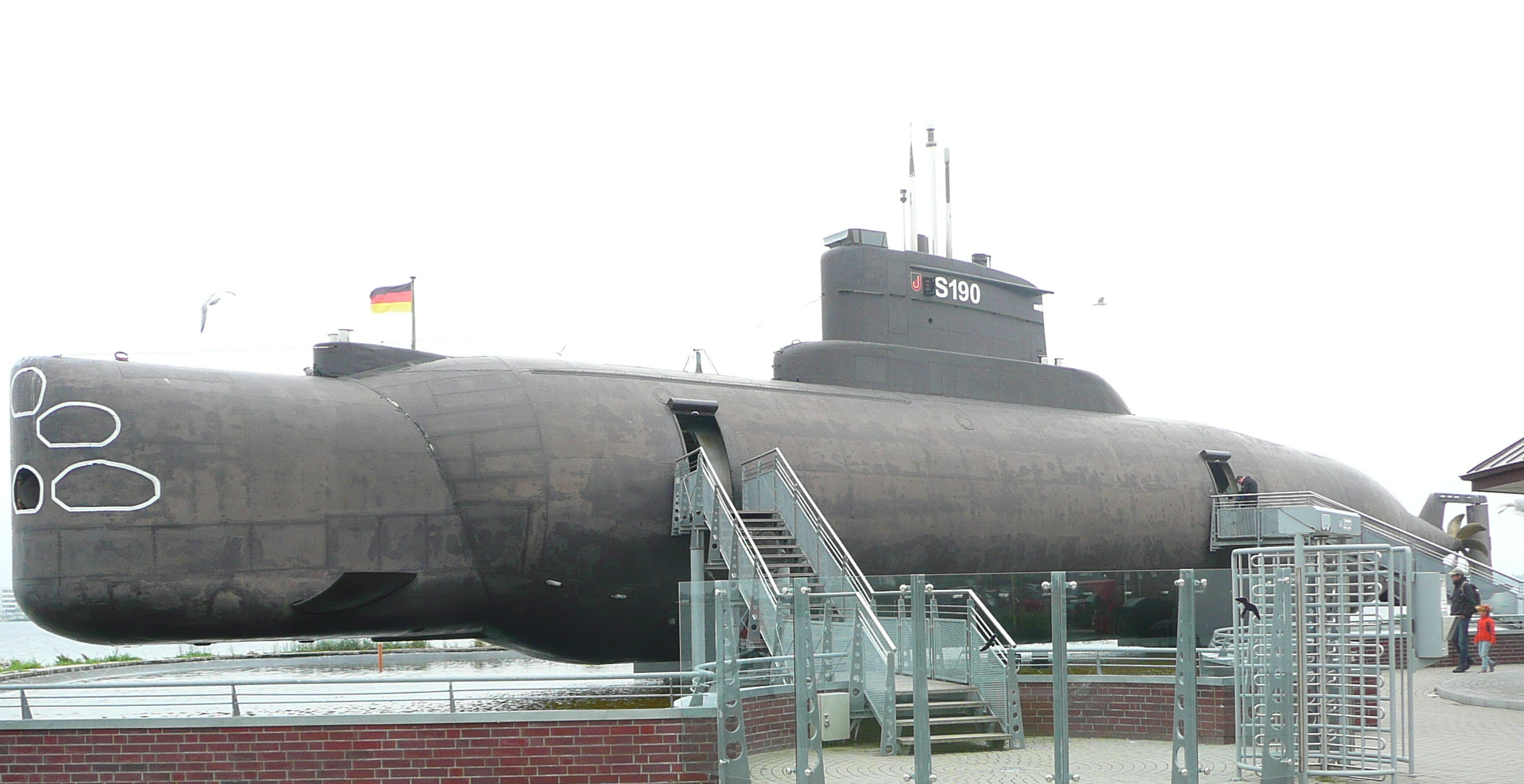 U11 von der Backbordseite fotografiert